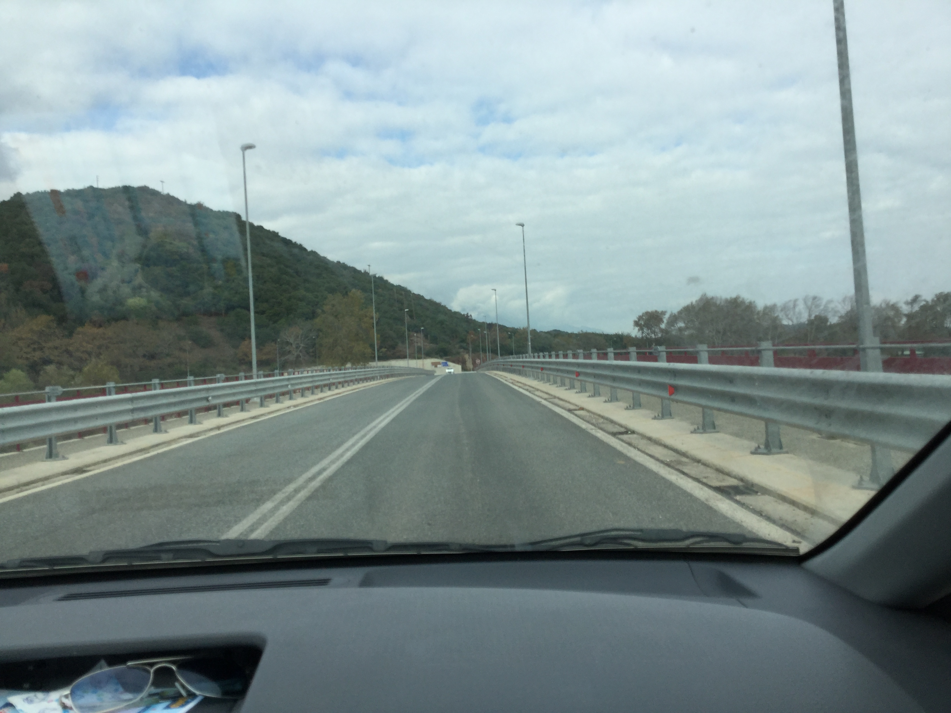 Η νέα γέφυρα του Πορταϊκού.